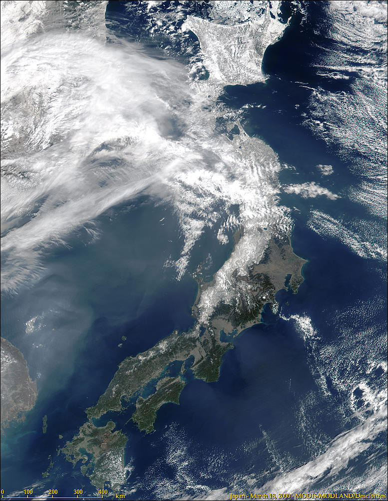 Satellietfoto van Japan